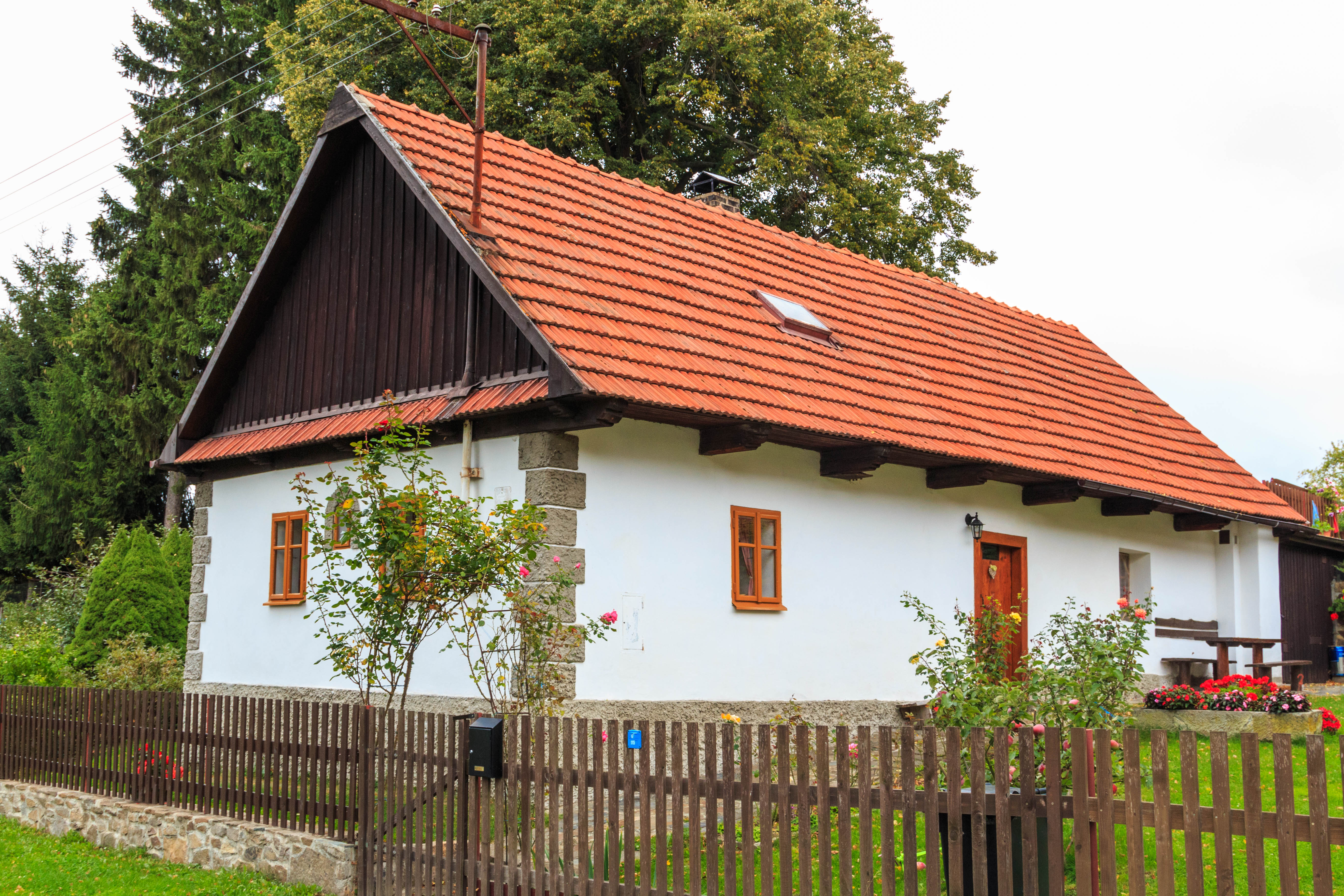 Pukšice čp. 13